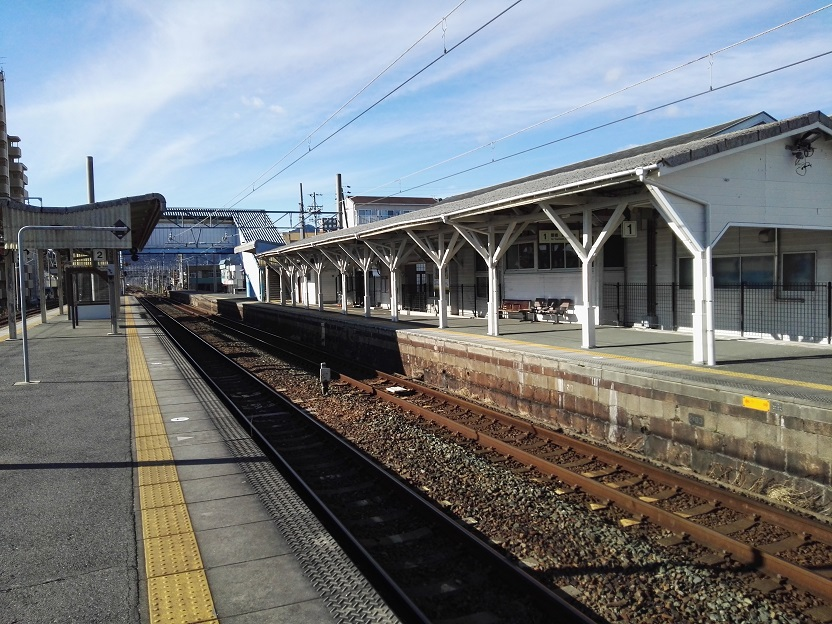 Aichi Mito station platform